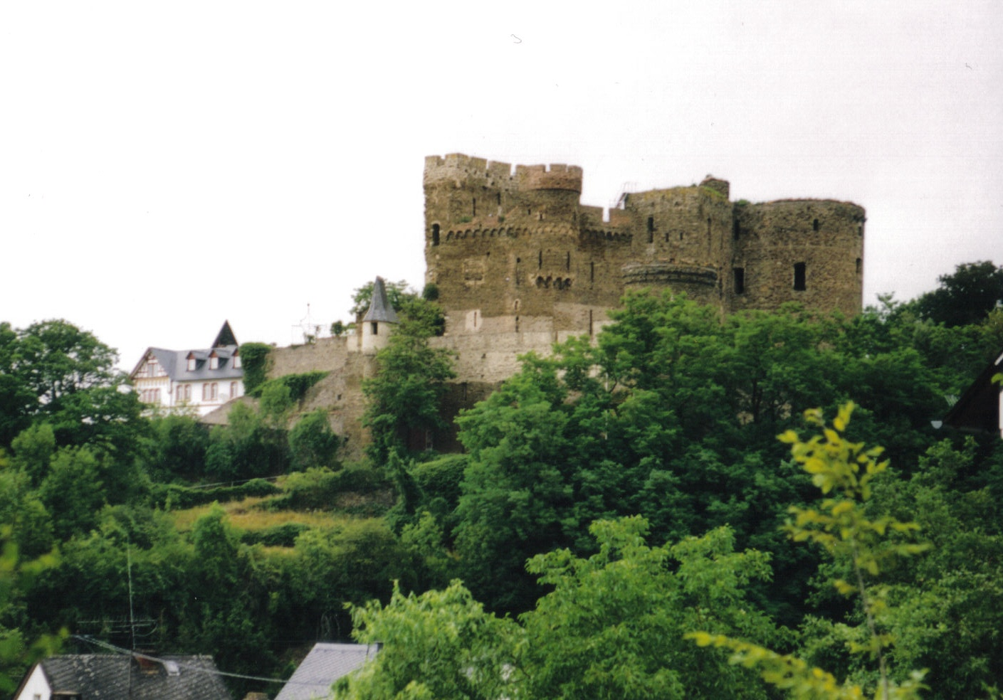 Reichenberg von Süden